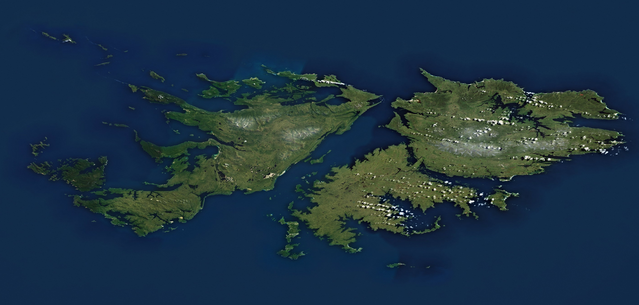 Insulele Falkland văzute din spaţiu. Imagine realizată cu date SRTM furnizate liber de NASA.